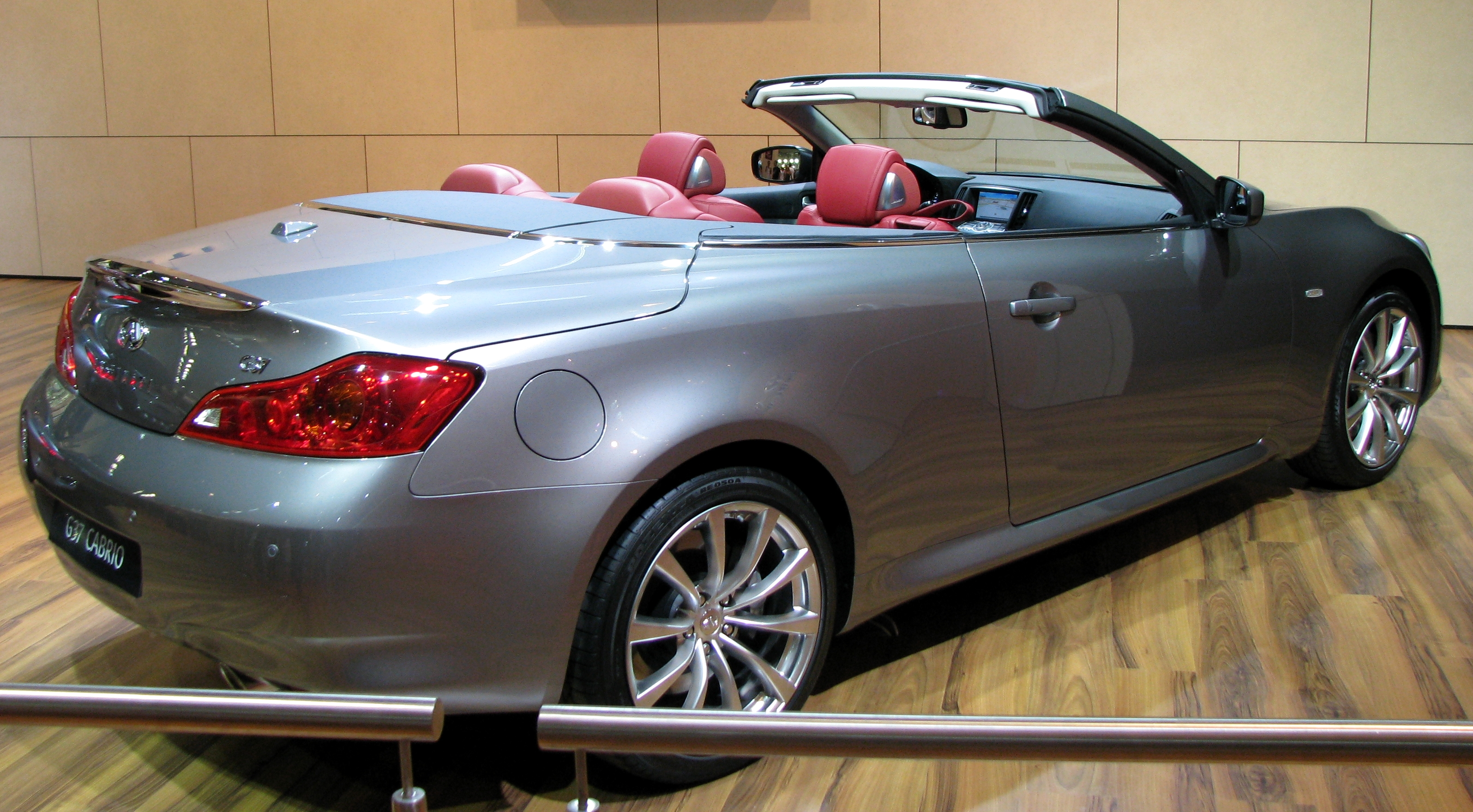 Infiniti G37 Cabrio en el Salón Internacional del Automóvil de Barcelona 2009.